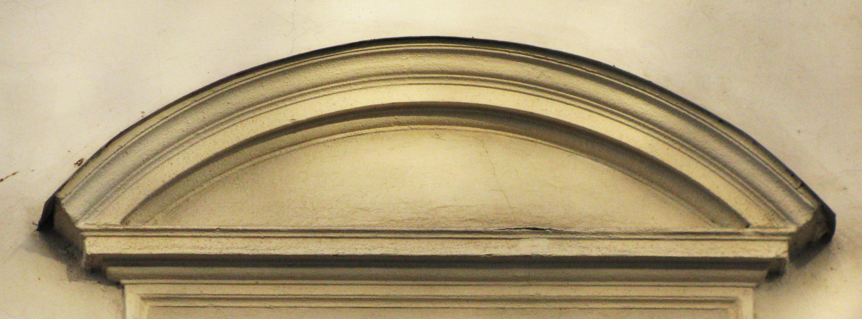 Вулиця Галицька,18 (1873)